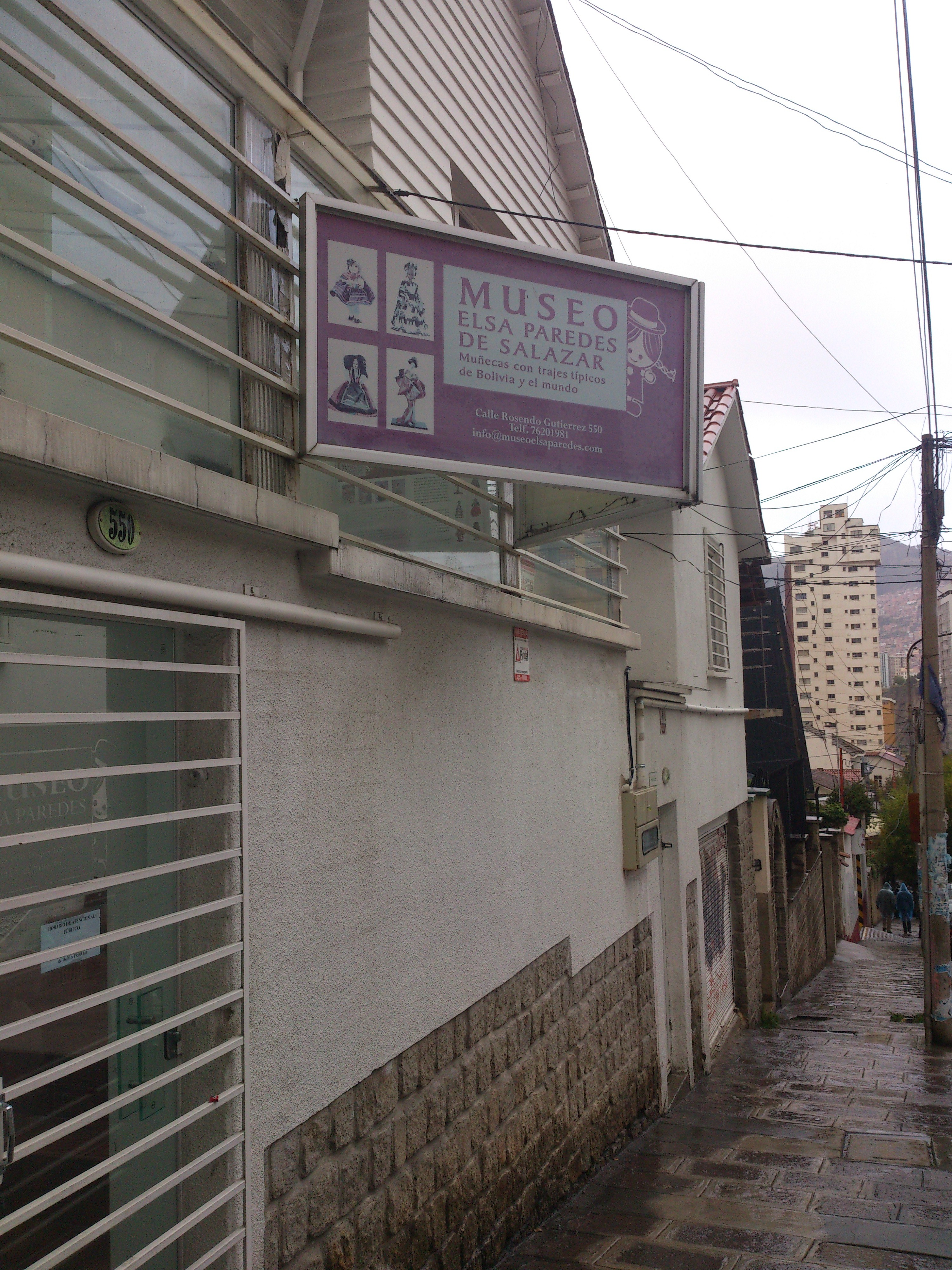 Museo Elsa Paredes de Salazar, colección de muñecas bolivianas y del mundo. La Paz, Bolivia.